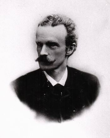 Carl Theodor in Bayern, deutscher Augenarzt und der Schwiegervater des belgischen Königs Albert I. sowie des bayerischen Kronprinzen Rupprecht. Fotografie von B. Dittmar, um 1900.[1]